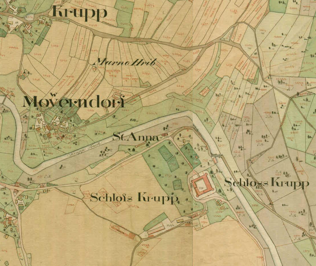 Franciscejski kataster za Kranjsko, 1823-1869